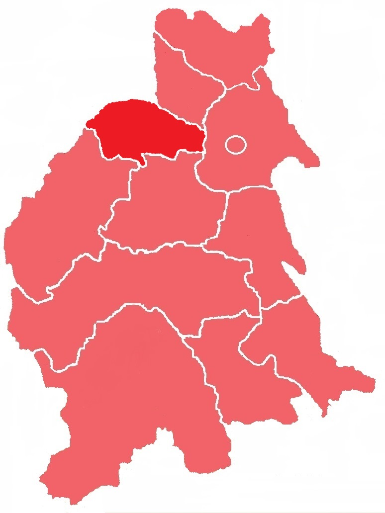 Вашківський повіт Герцогства Буковина